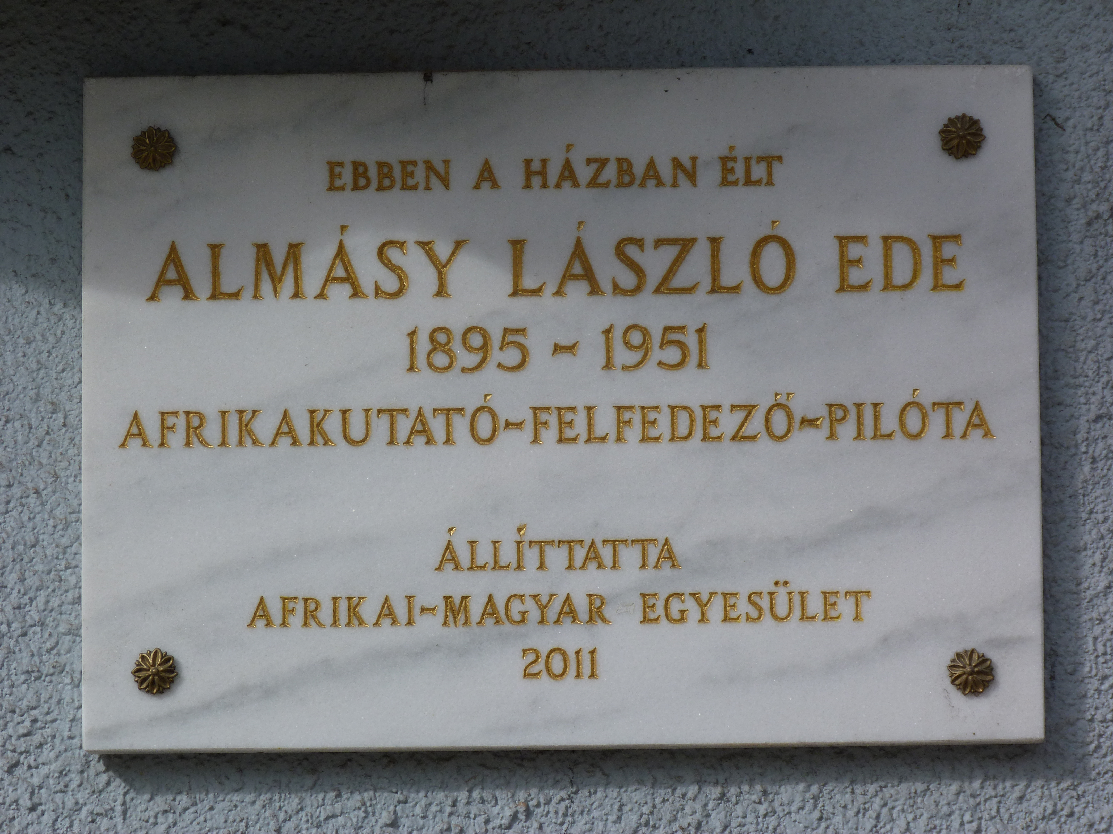 A felvétel 2013. február 26 -án készült Budapesten, Újbudán. Bartók Béla út 29 szám. Almásy László emléklapja. 2011 December 7-én Újbuda Önkormányzata avatta fel az emléktáblát. Ma lakása mecsetként működik. Szobra Érden, a Magyar Földrajzi Múzeum kertjében található. Róla nevezték el az általa létrehozott, az egyiptomi Héliopolisz melletti Al-Máza repülőteret. Róla nevezték el a sivatag belsejében álló egyik hegyet Gebel Almazi –ra. Források: Almásy emléktábla avatás hozzáférés 2013.02.26 Bucsy Levente: Furfangja segítette át a nehézségeken hozzáférés 2013.02.26 Dr. Kubassek János A Szahara bűvöletében hozzáférés 2013.02.26 Almásy László - Sir Clayton afrikai sivatag-expedíciója Magyar Világhíradó 442 Fennmaradt az 1929-es expedícióról forgatott némafilm az igazi Almásyról, melyet az Angol beteg premierjével egy időben mutattak be. Egyesült Királyság Nemzeti Archivuma Operation Salaam dosszié Az utazásairól vezetett naplói eltűntek, a németeknek küldött jelentéseit az angolok elfogták, így ezek a londoni Imperial War Museumba kerültek. Szervezetek: Magyar Repüléstörténeti Társaság Magyar Egyiptomi Baráti Társaság Afrikai-Magyar Egyesület Magyar Aviatikai Alapítvány Aero Club (Kairó) Egyiptomi Térképészeti Intézet Címkék: Almásy László Zarzura oázis Gebel Almazi Héliopolisz Al-Máza Repülőtér